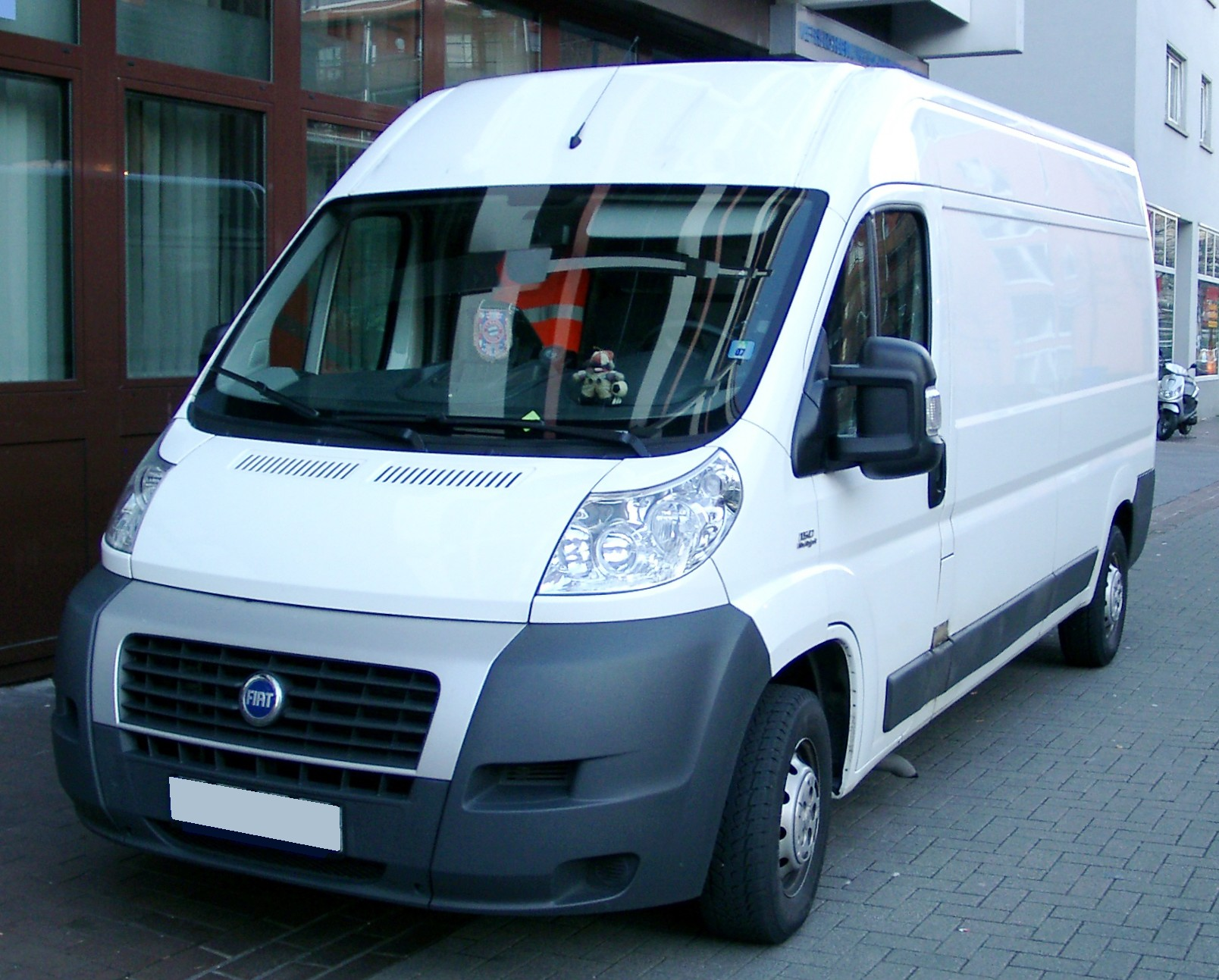 Fiat Ducato, 3. Generation